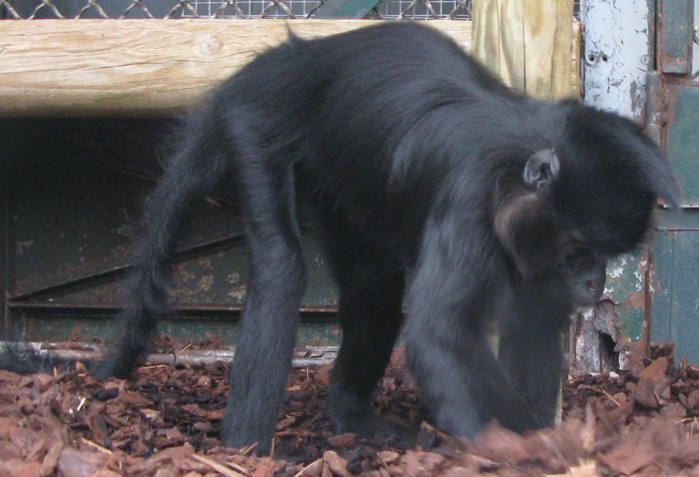 Mangabey noir (lophocebus aterrimus) cherche à manger, à la ménagerie du Jardin des plantes de Paris.